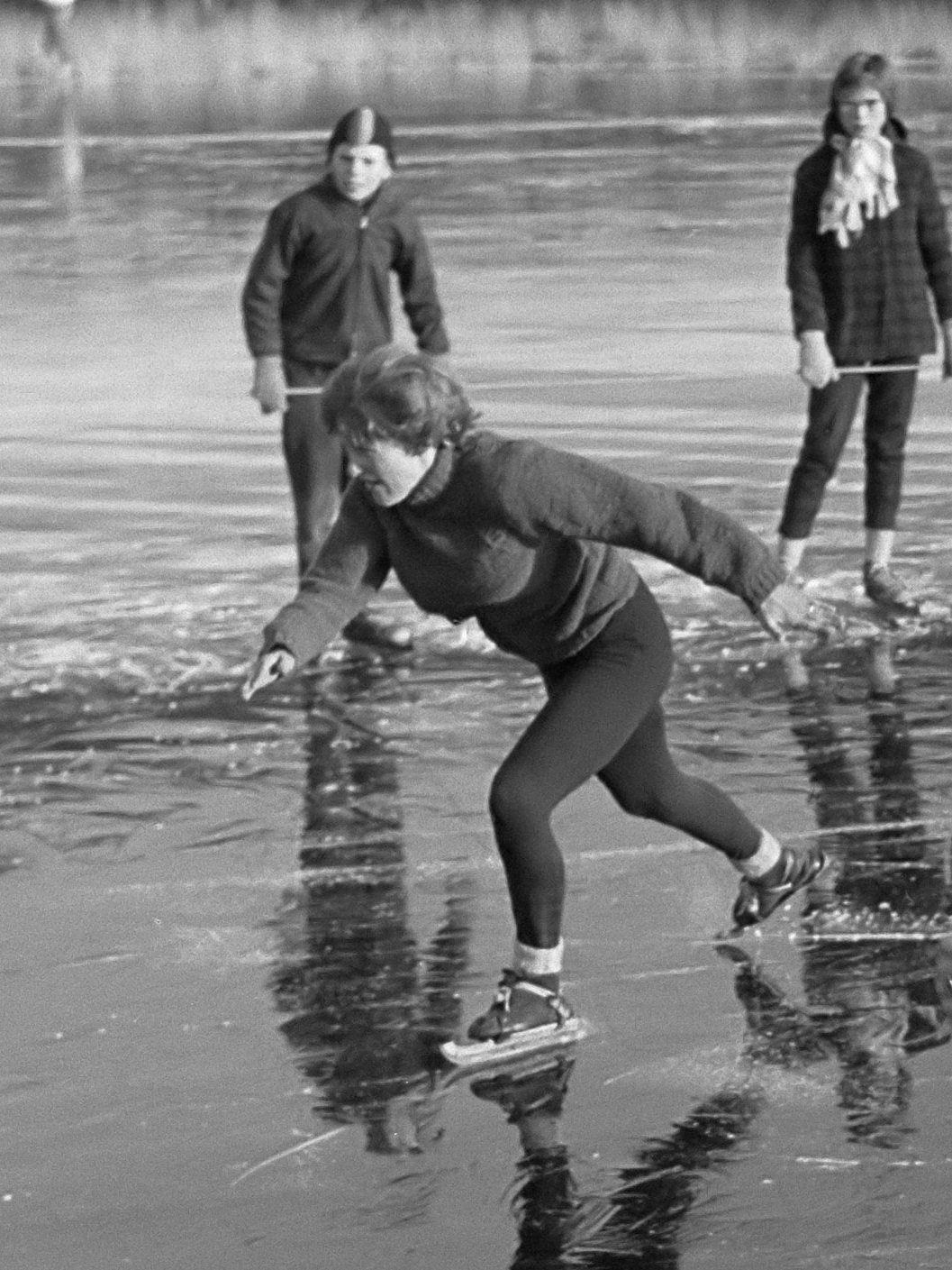 Hardrijderijen voor vrouwen in Beetsterzwaag. Atje Deelstra en Hennie Mulder 18 december 1961